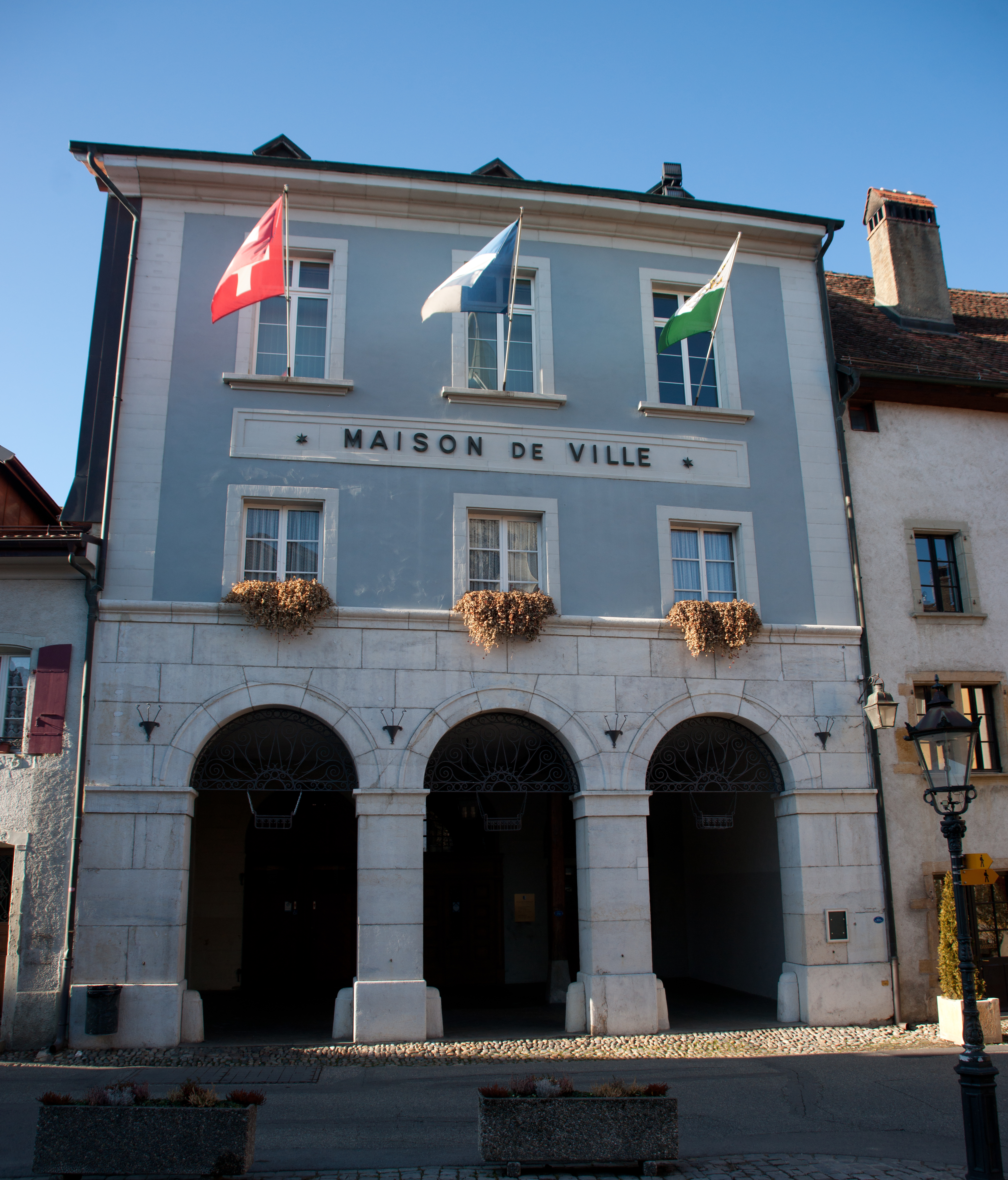 Hôtel de ville de Cossonay, canton de Vaud, Suisse.